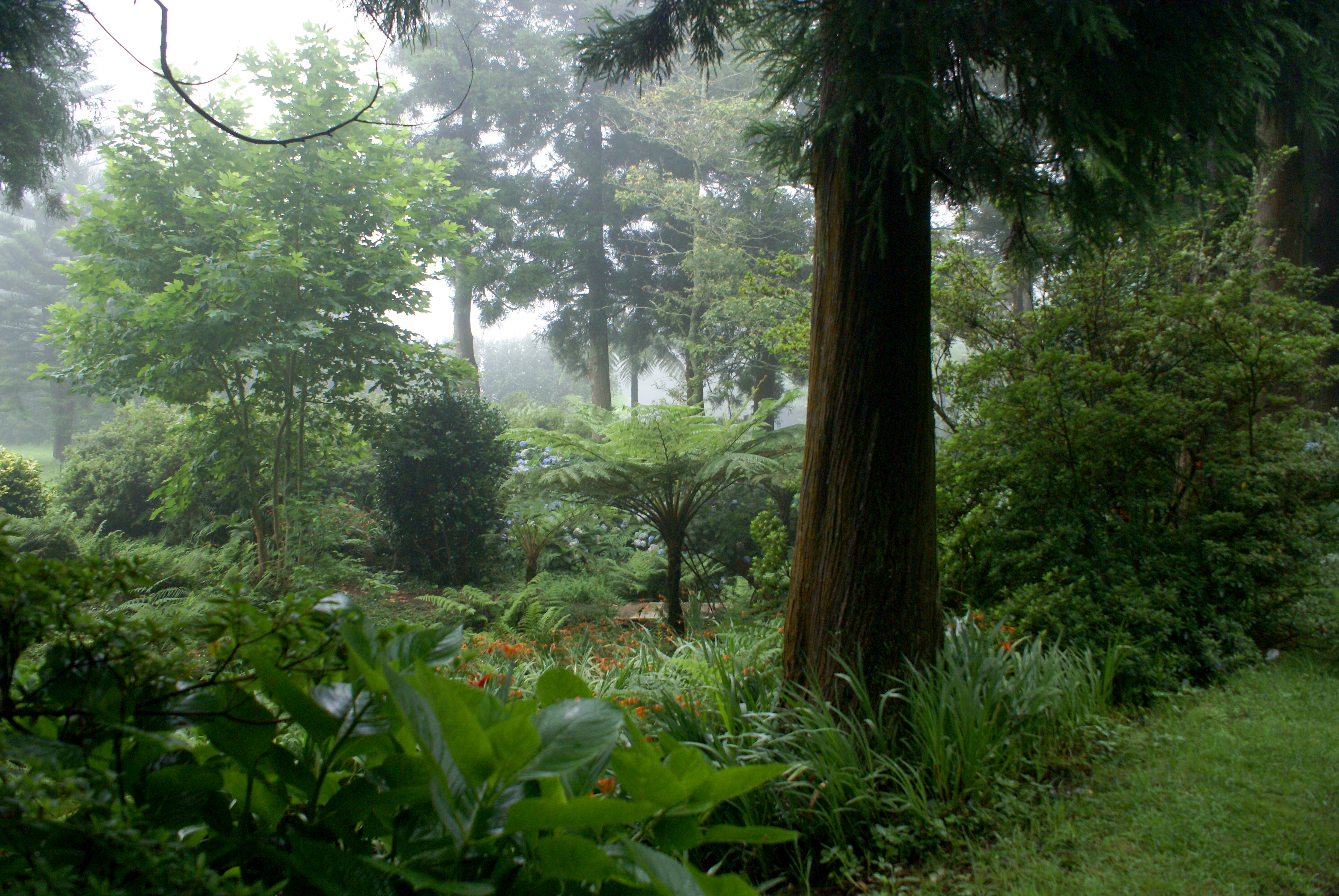 Em dia de Nevoeiro, Parque das Sete Fontes, Velas, ilha de São Jorge, Açores.